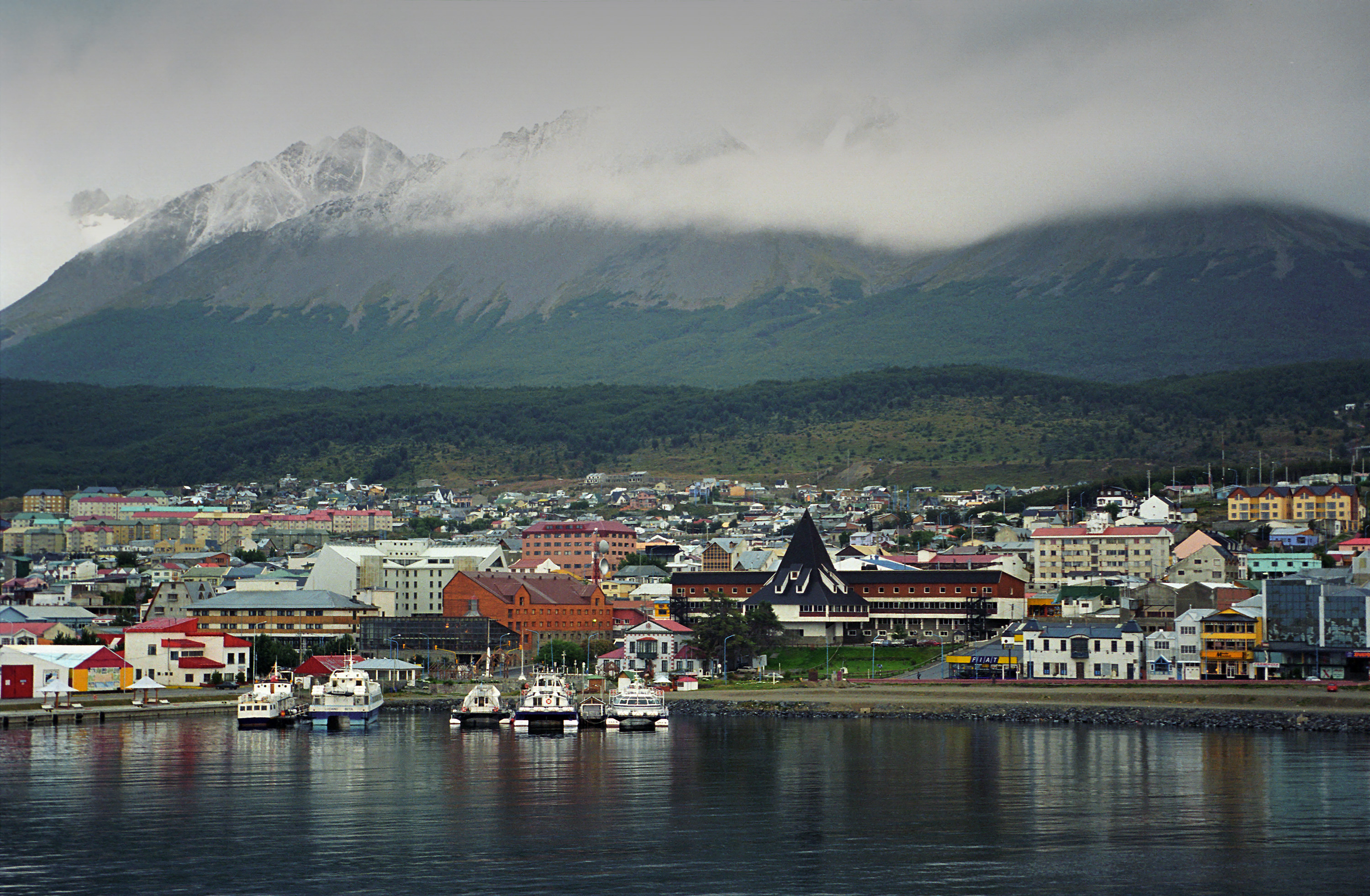 Ushuaia, harbour